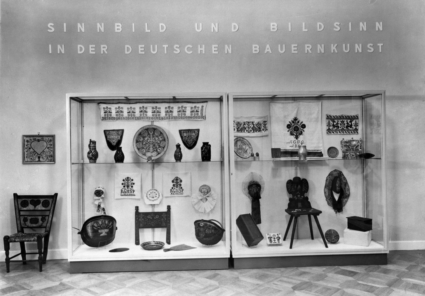 1934 übernahm das Museum das Schloss Bellevue, das seinen Belangen gemäß umgebaut wurde. Im Hauptgebäude wurde ab Oktober 1935 eine große Wechselausstellung mit dem Titel „Deutsche Bauernkunst“ gezeigt. GLAM-on-Tour: Wiki goes MEK! 2.0 Wikipedianer fotografierten vom 16. bis 18. November 2018 im Museum Europäischer Kulturen. This photo was taken during a project supported by WMDE. Gefördert von / Supported by: Wikimedia Deutschland, Museum Europäischer Kulturen